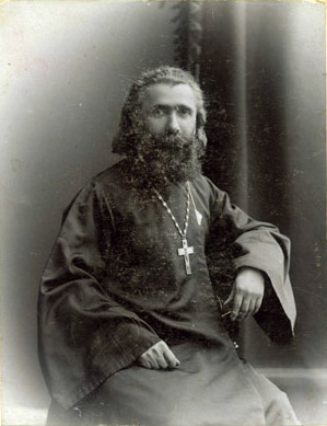 Каллистрат Цинцадзе в 1910 году